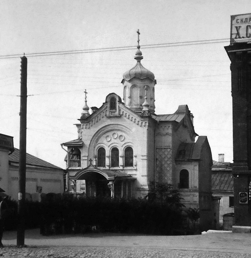 Церковь Николая Чудотворца на Нижнем Посаде в Нижнем Новгороде